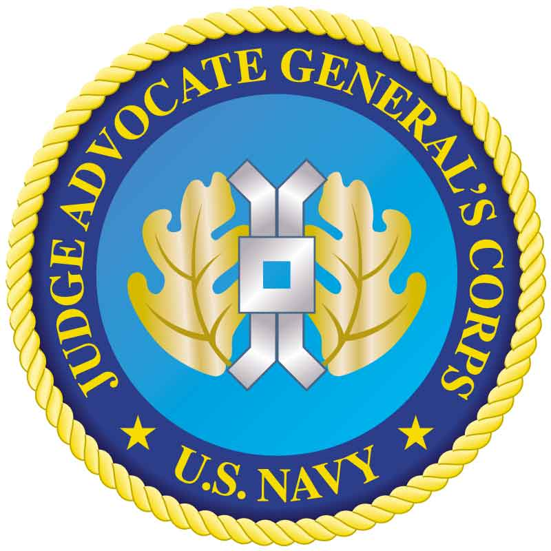 Emblema del JAG